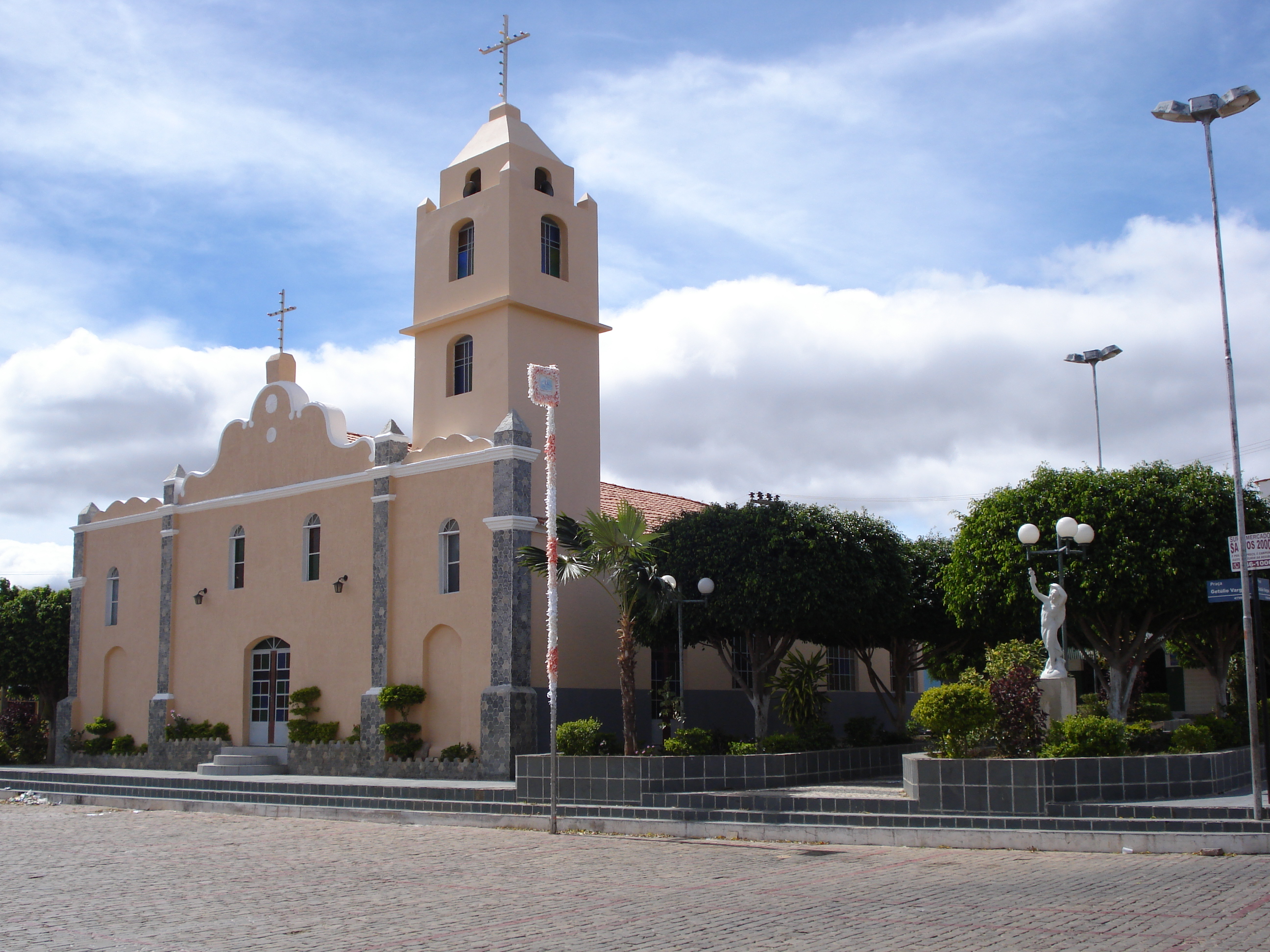 Esta foto foi tirada por mim, quanddo estive de féria em Ipupiara